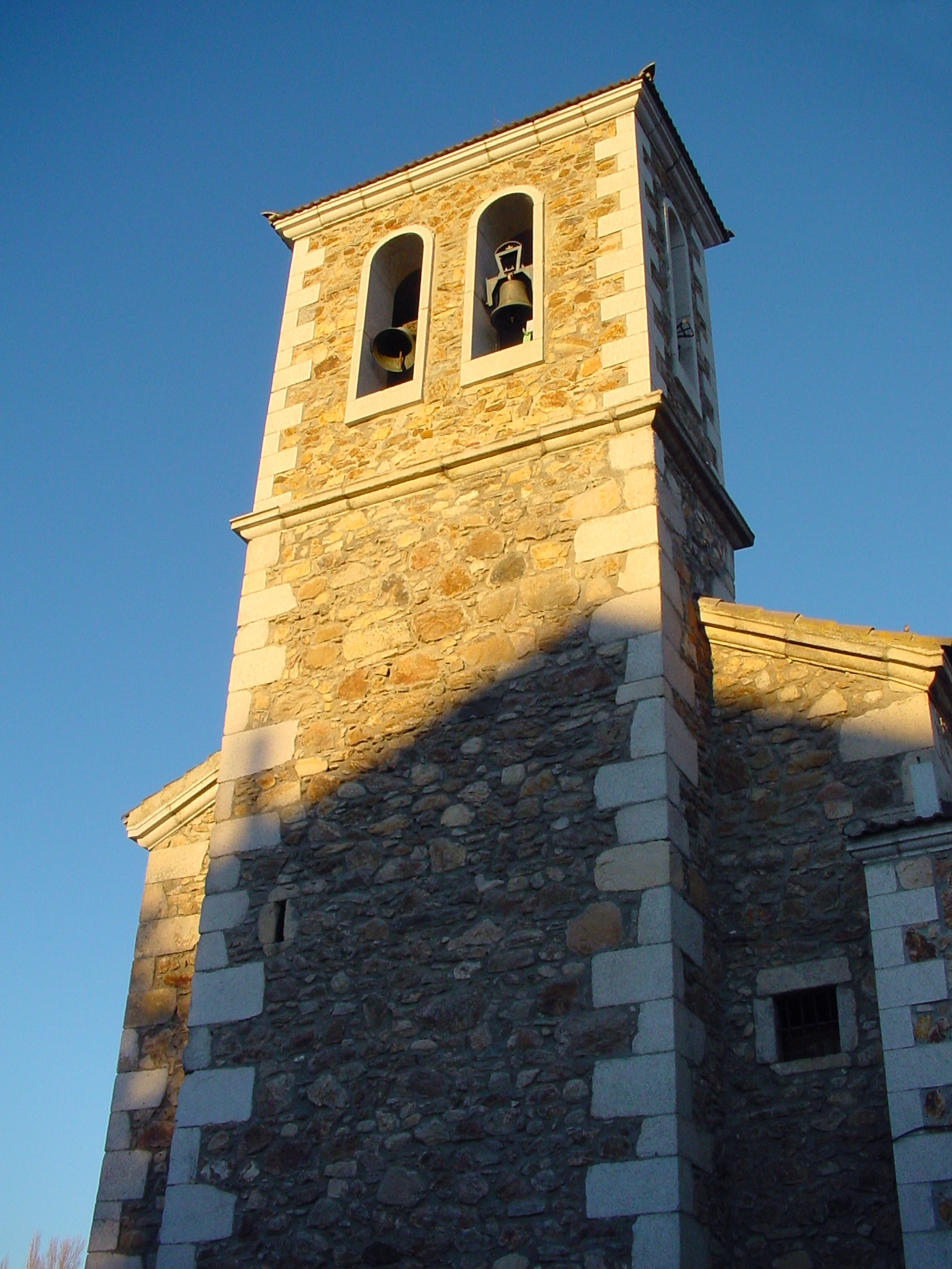 Torre de iglesia en Gascones.